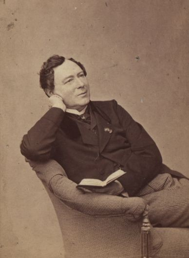 Konrad Loewe (1856-1912), rakouský herec a dramatik.